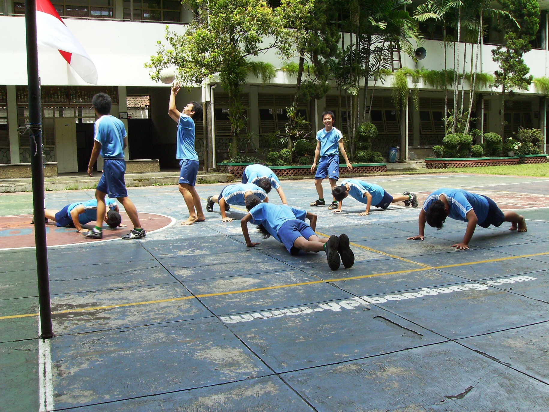 Siswa - Siswa SMA Trinitas melakukan push-up sebagai hukuman karena kalah dalam permainan bola voli